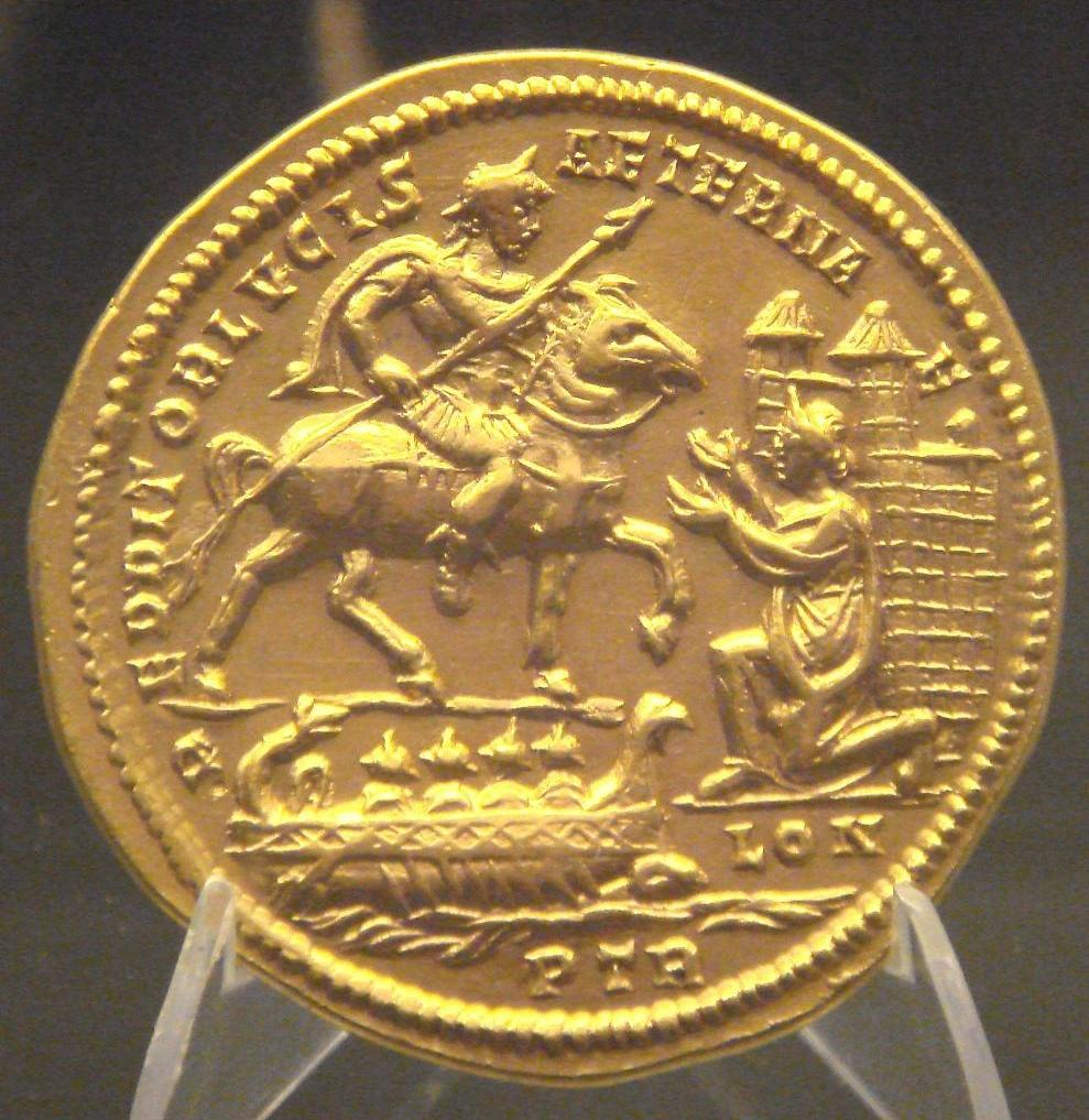 Below: Roman emperor Constantius I capturing London after defeating Allectus, illustrated on a medal/coin from the Beaurains hoard).